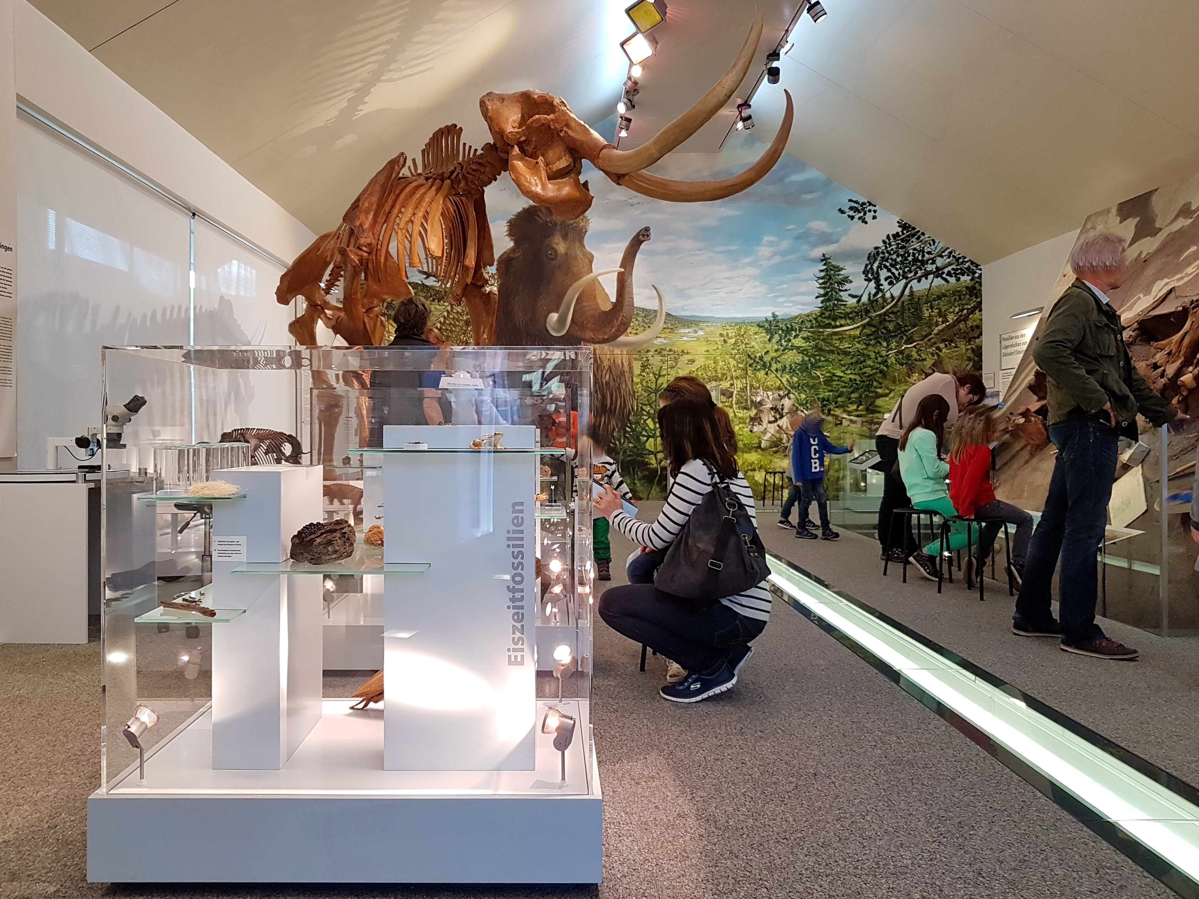 Mammutmusem in Niederweningen (Switzerland)